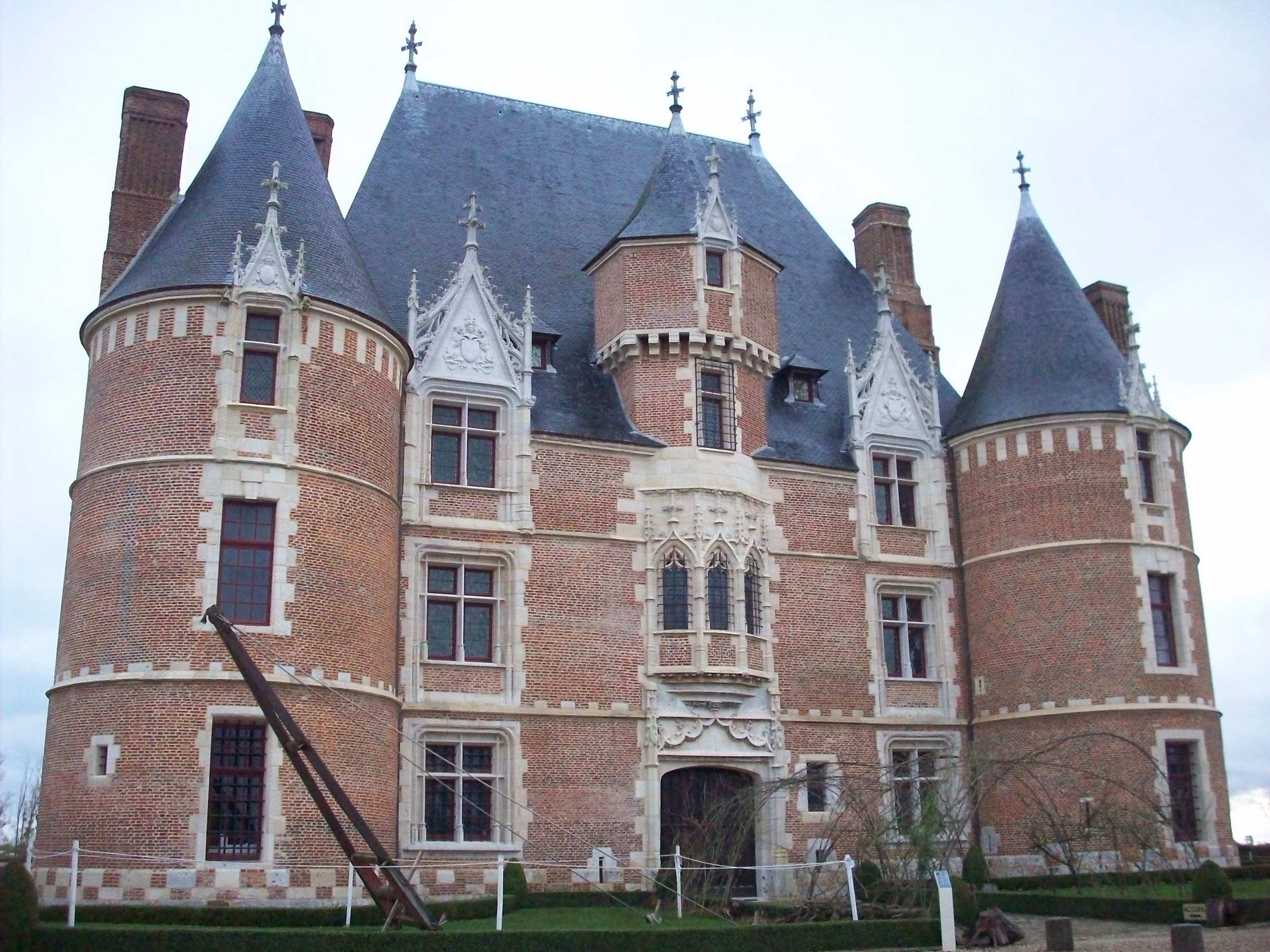 Vue du château de Martainville, après restauration de ses façades.